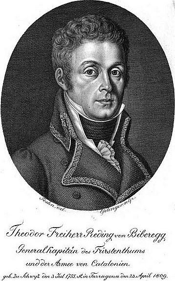 Theodor Reding von Biberegg (1755–1809)